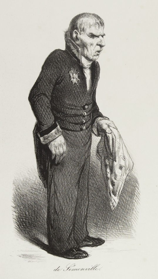 Charles-Louis Huguet de Sémonville, caricature par Honoré Daumier, 1835